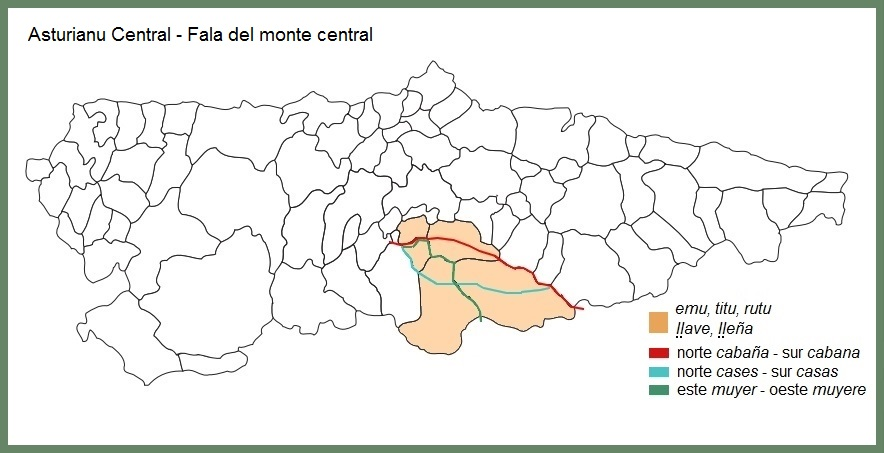 Asturianu central - Fala del monte central